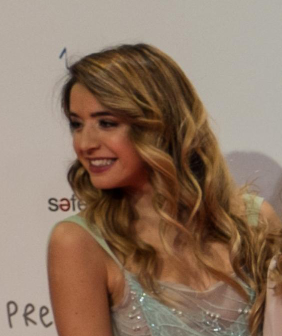 Participantes de Operación Triunfo España (2017) en la entrega de los premios Forqué.